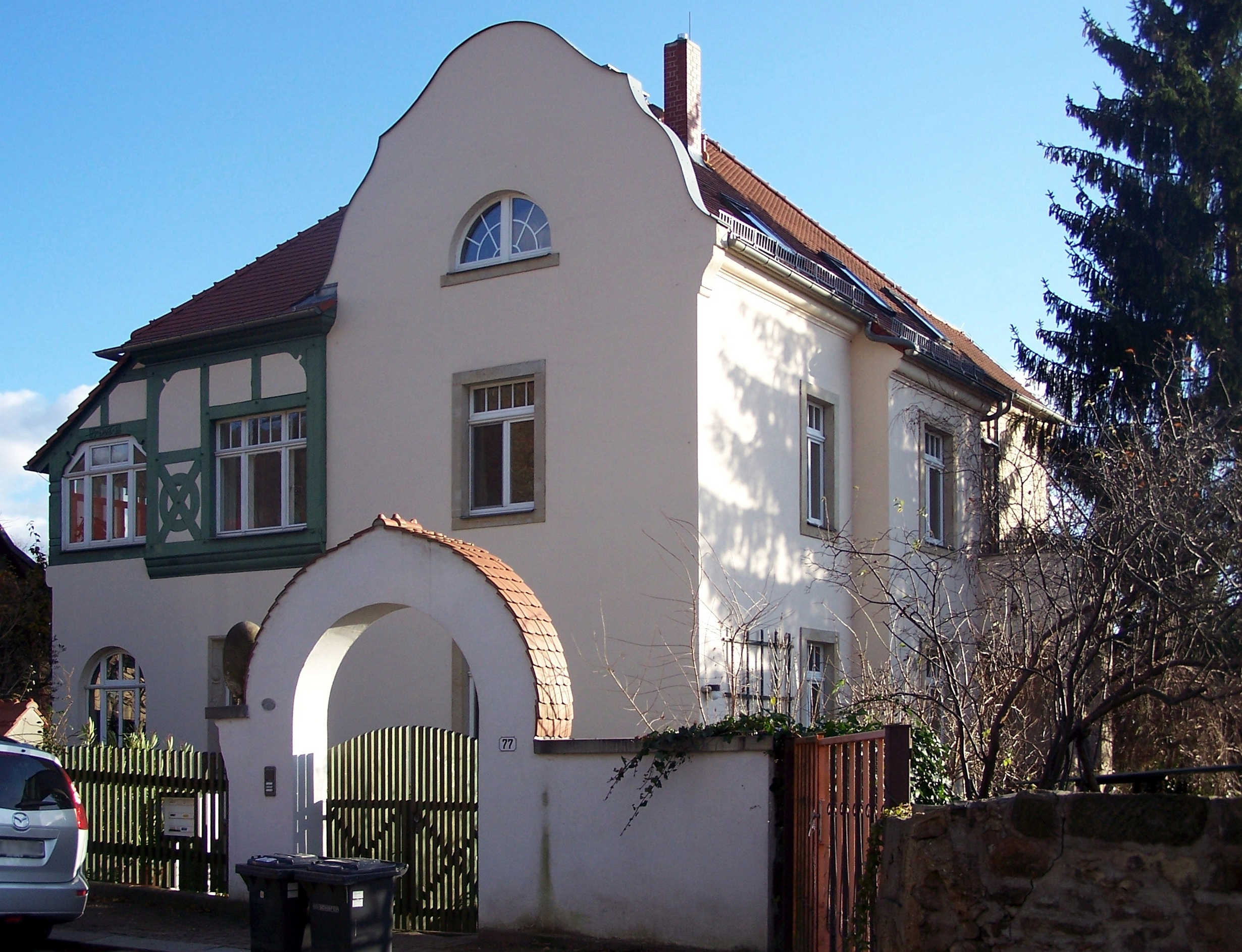 Augustusweg 77 in Radebeul